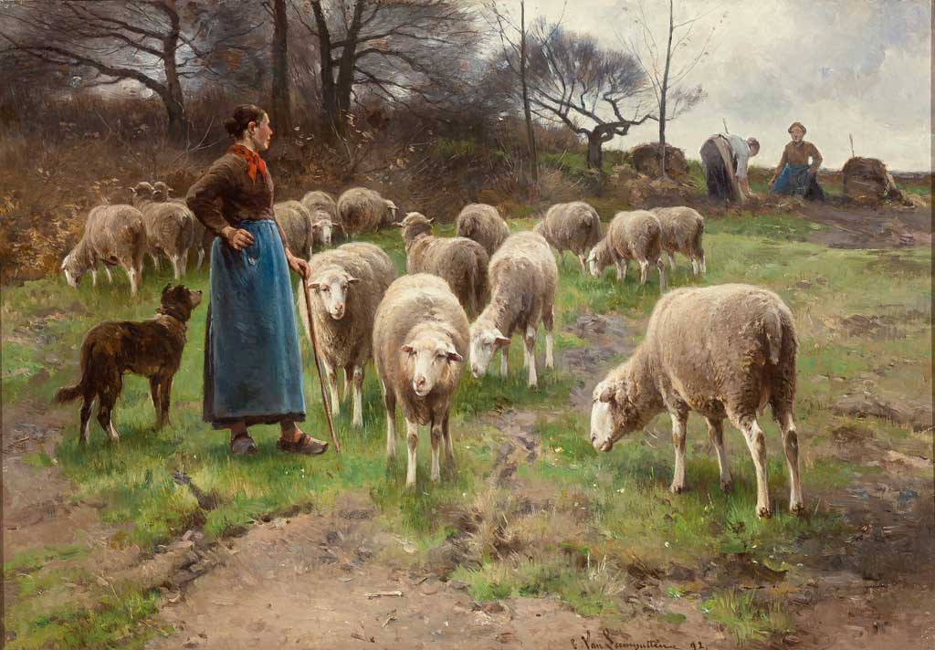 Weidende Schafe vor einem Kartoffelfeld, Bäuerinnen bei der Arbeit. Öl auf Leinwand. 56,5 x 80 cm. Signiert und (18)92 datiert.